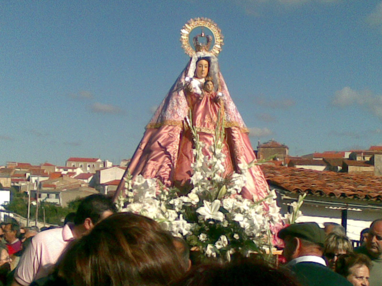 NUESTRA SANTISIMA VIRGEN DEL CAMPO (ALISEDA)